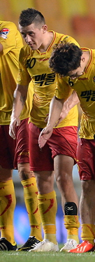 성남 일화 천마 제파로프